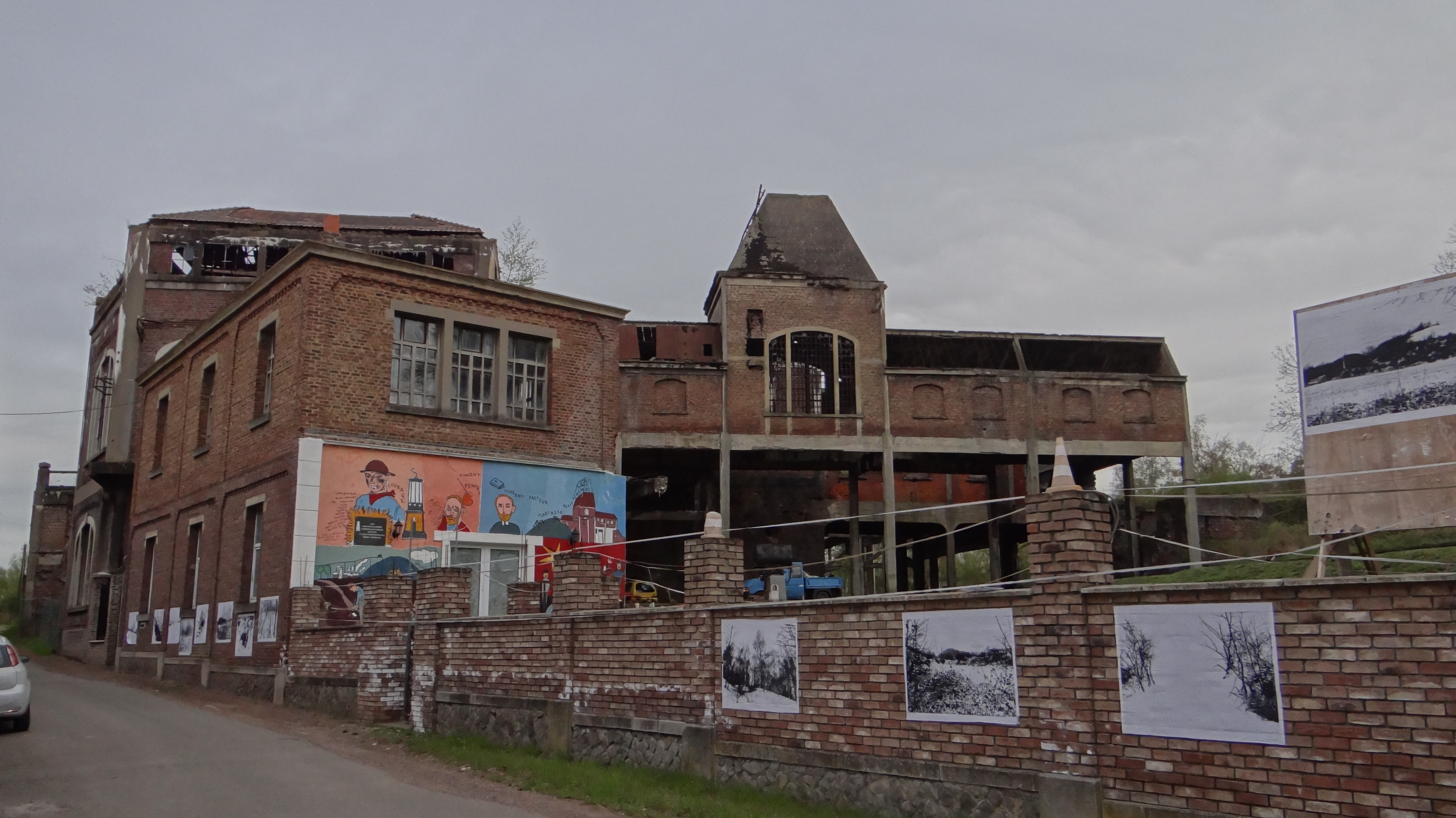 Wasmes - Charbonnage de Marcasse